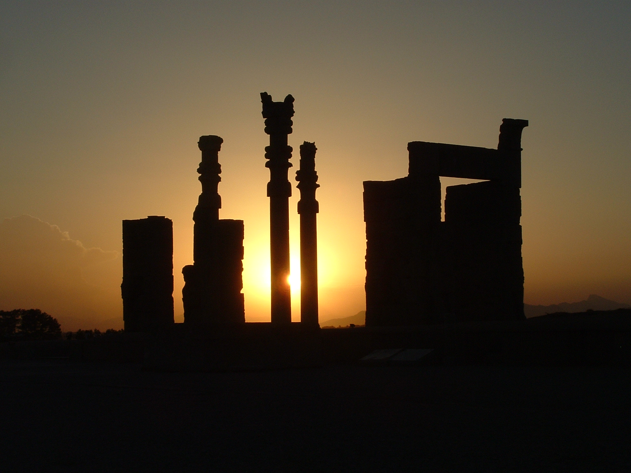 Sonnenuntergang